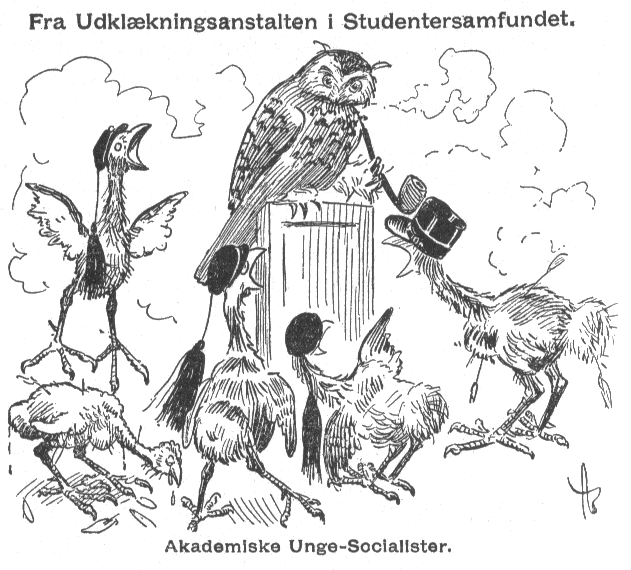 Karikatur av Andreas Bloch fra "Korsaren" 1908.